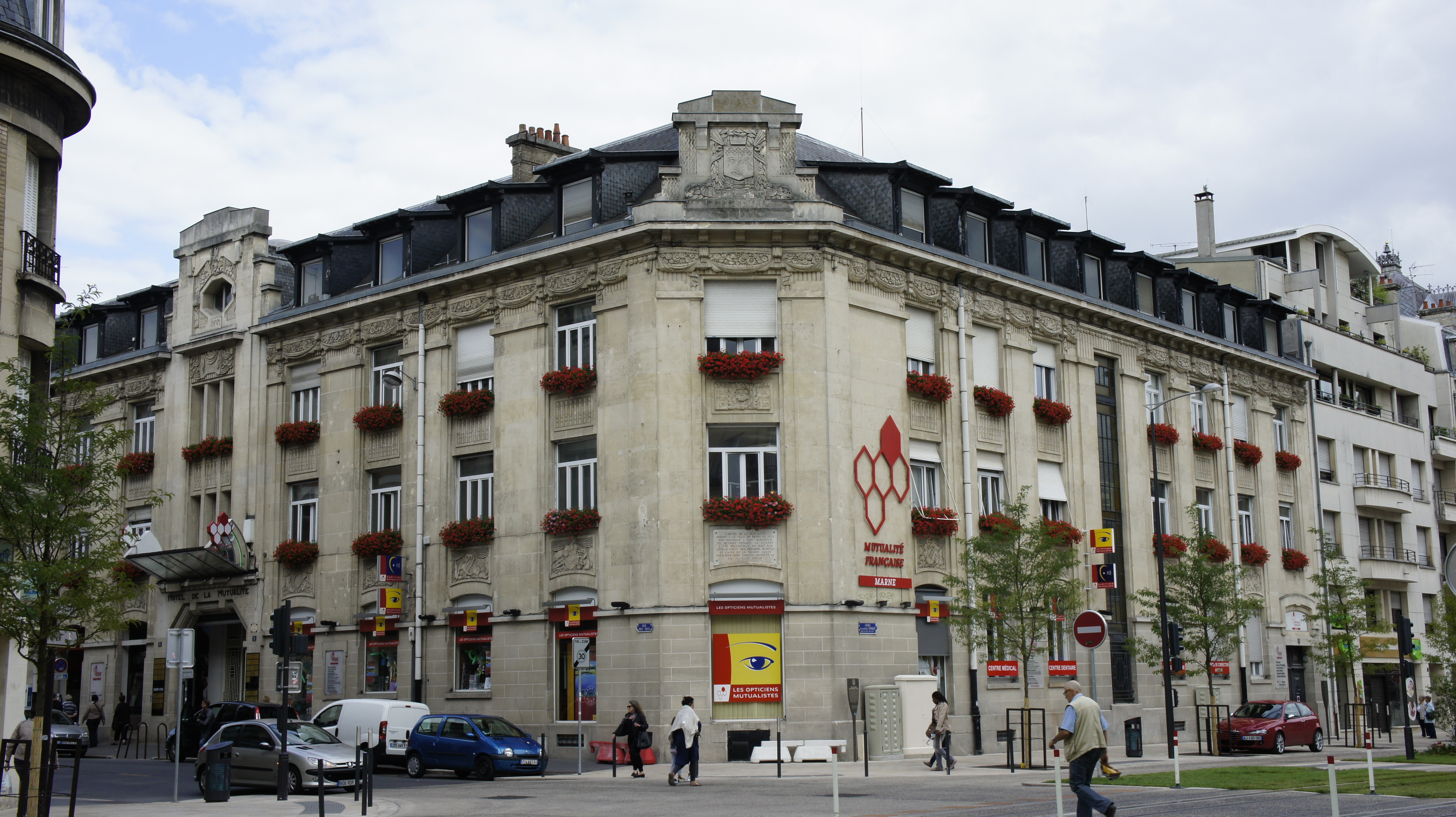 l'immeuble de la Mutualité Cours Jean-Baptiste Langlet.